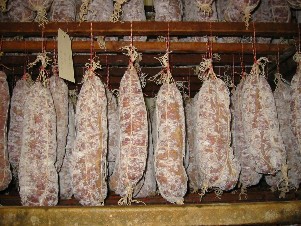 Salaison de montagne, Noël Thaurin, Moutaine, Jura, France